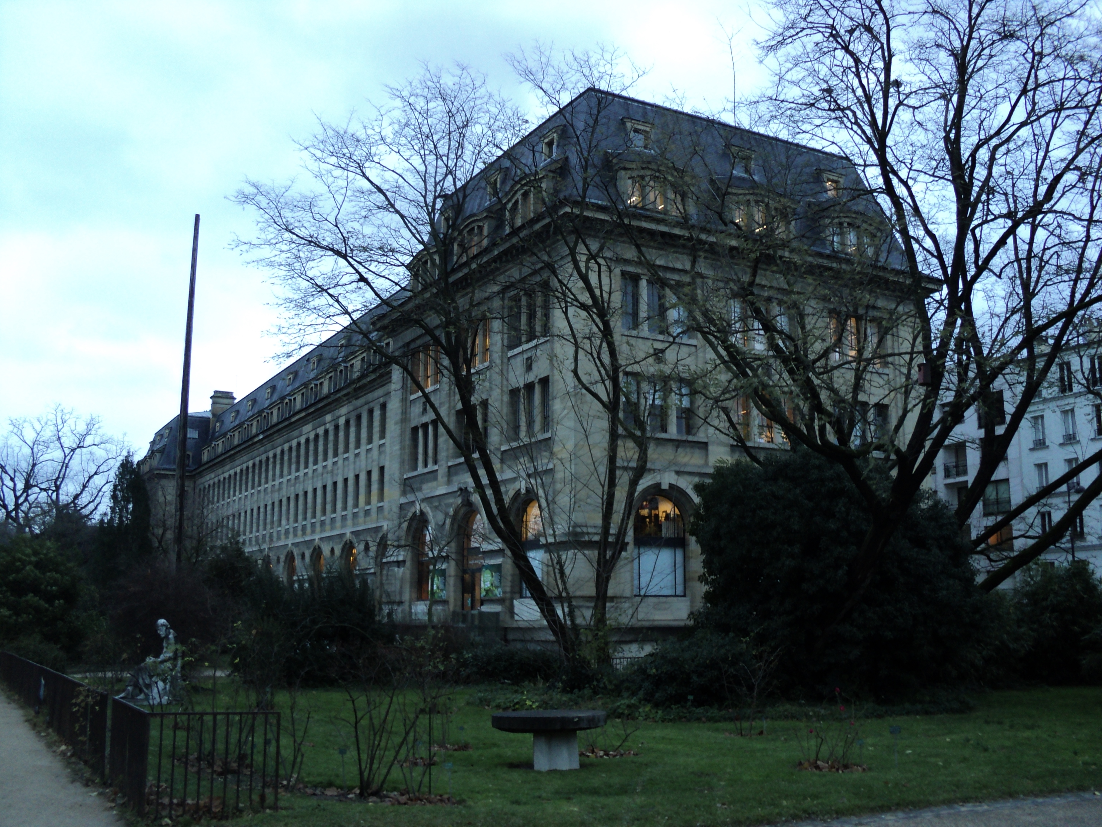 Galerie de Botanique, Muséum national d'histoire naturelle, Jardin des plantes, Paris, le 11 décembre 2017. Les branchages en premier plan sont les rejets du robinier faux-acacia que Jean Robin planta vers 1610.